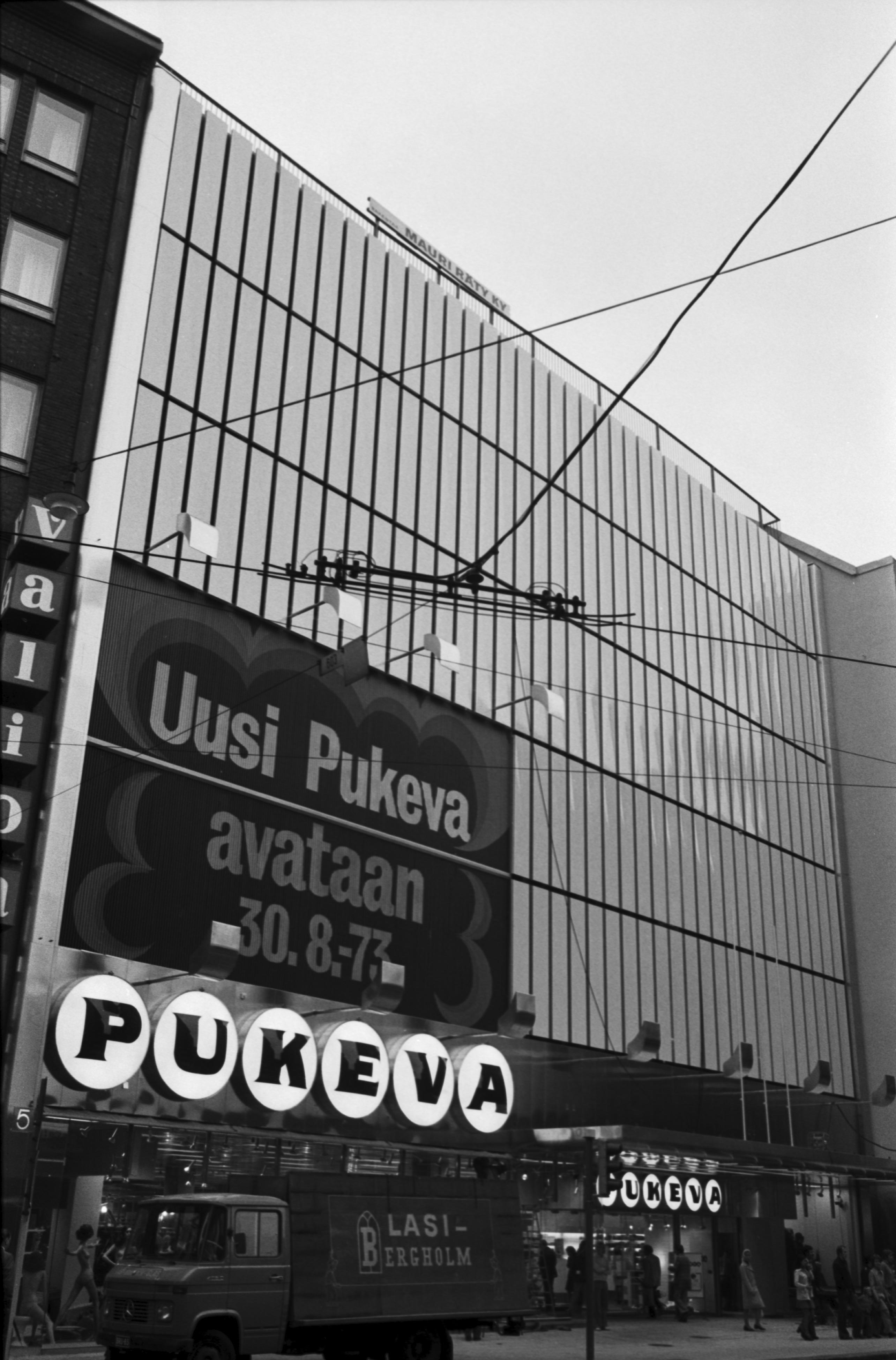 Pukevan tavaratalo laajennusosan valmistuttua. Kaisaniemenkatu 5, Helsinki.